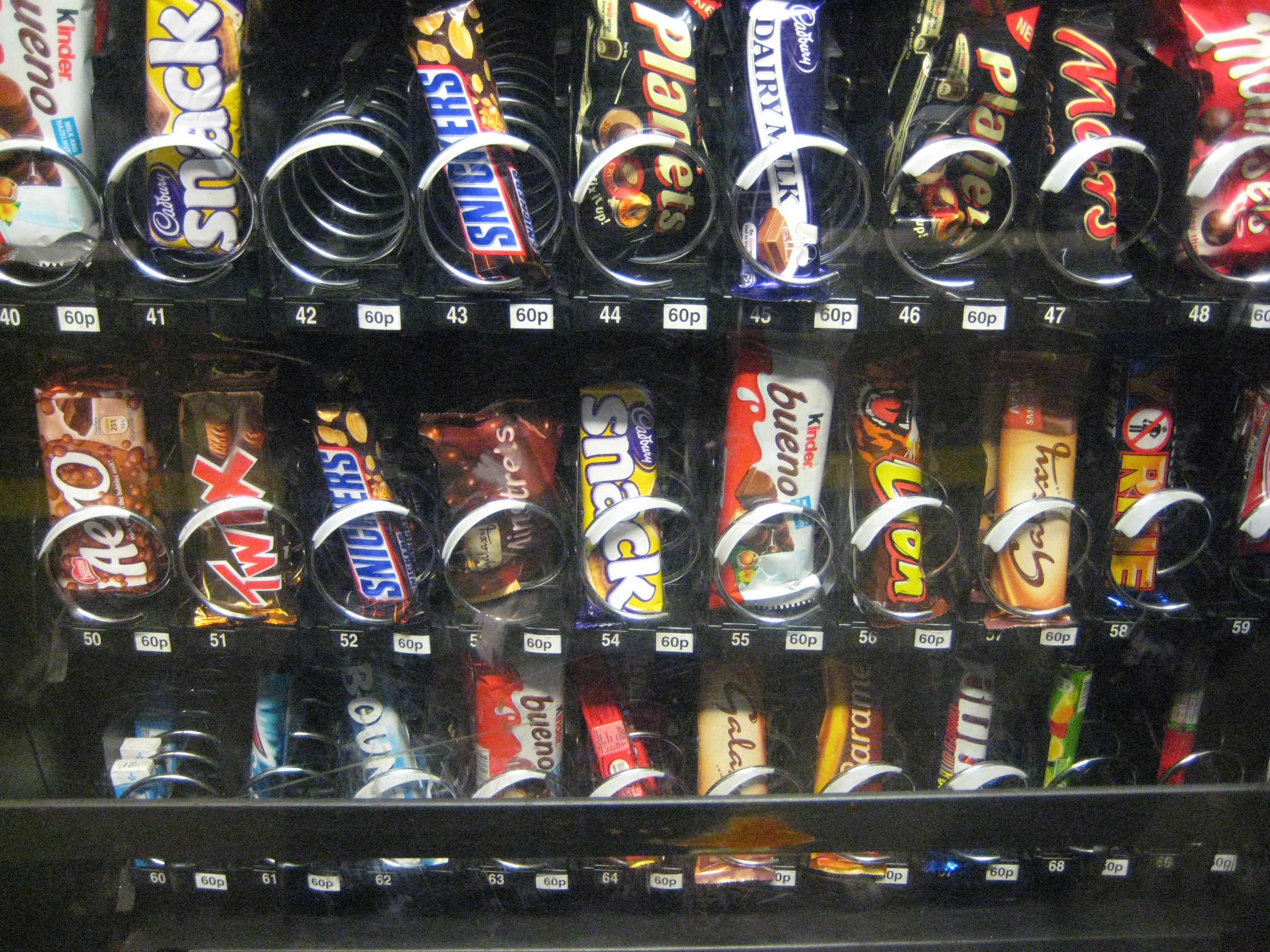 Vending Machine